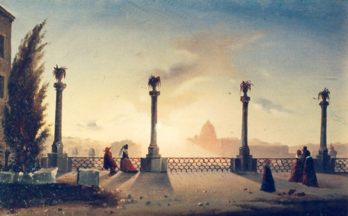 Gheorghe Tattarescu - Terasa de pe Monte Pincio - Peisaj din Italia reprezentând terasa Belvedere de pe Monte Pincio din Roma., Muzeul Municipiului Bucureşti, 23x37,5 cm.